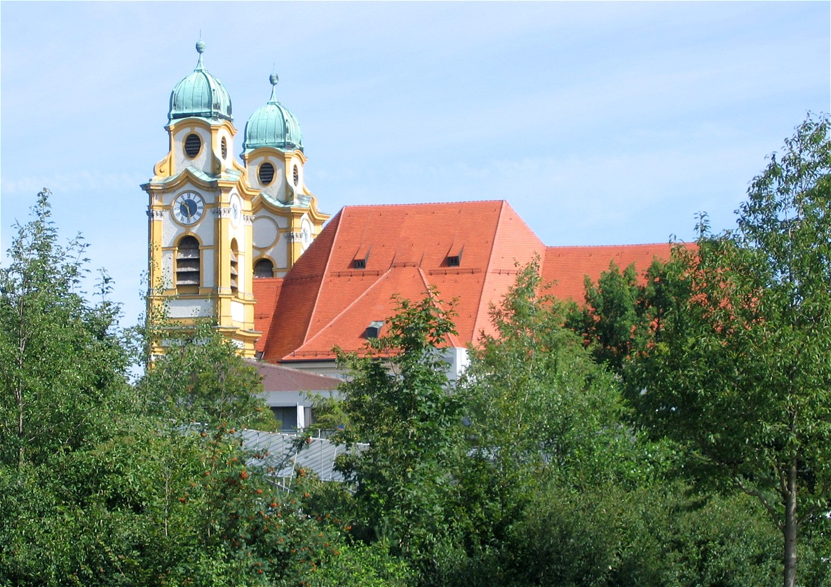 St. Michael Berg am Laim, München, Außenansicht von Süden